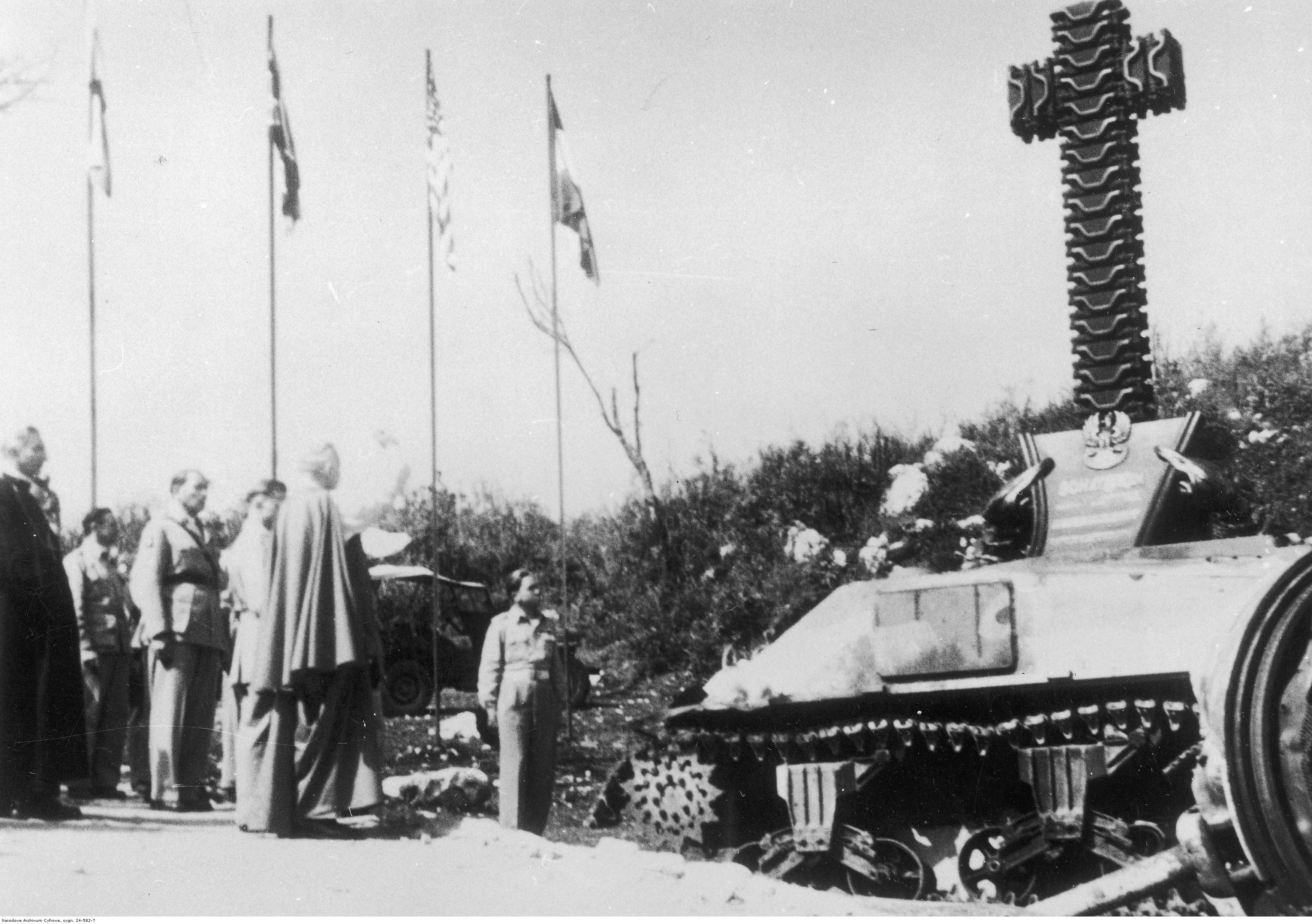 Pomnik 4 Pułku Pancernego "Skorpion" w "Gardzieli" pod Monte Cassino. Biskup polowy Wojska Polskiego Józef Gawlina święci pomnik 4 Pułku Pancernego. W uroczystości uczestniczy m.in. gen. Zygmunt Bohusz-Szyszko (3. z lewej). Archiwum Fotograficzne Tadeusza Szumańskiego. Sygnatura: 24-582-7